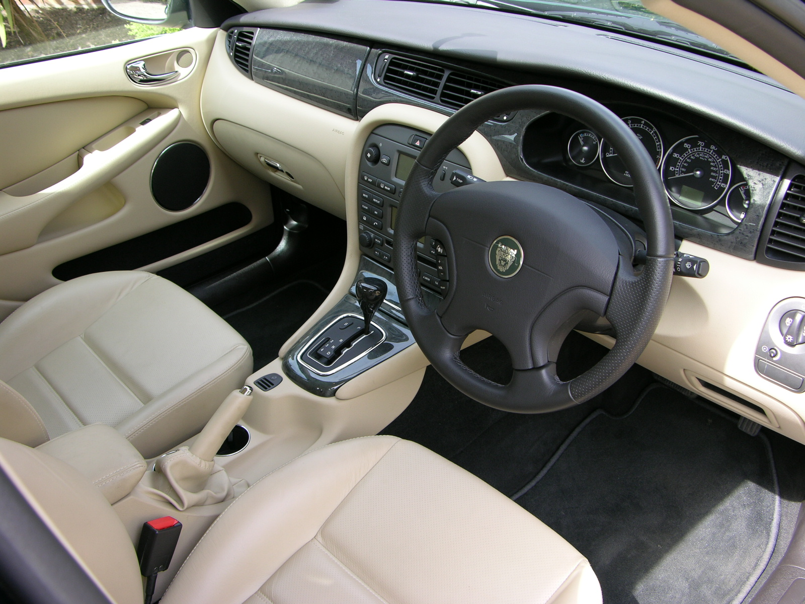 Jaguar XKR